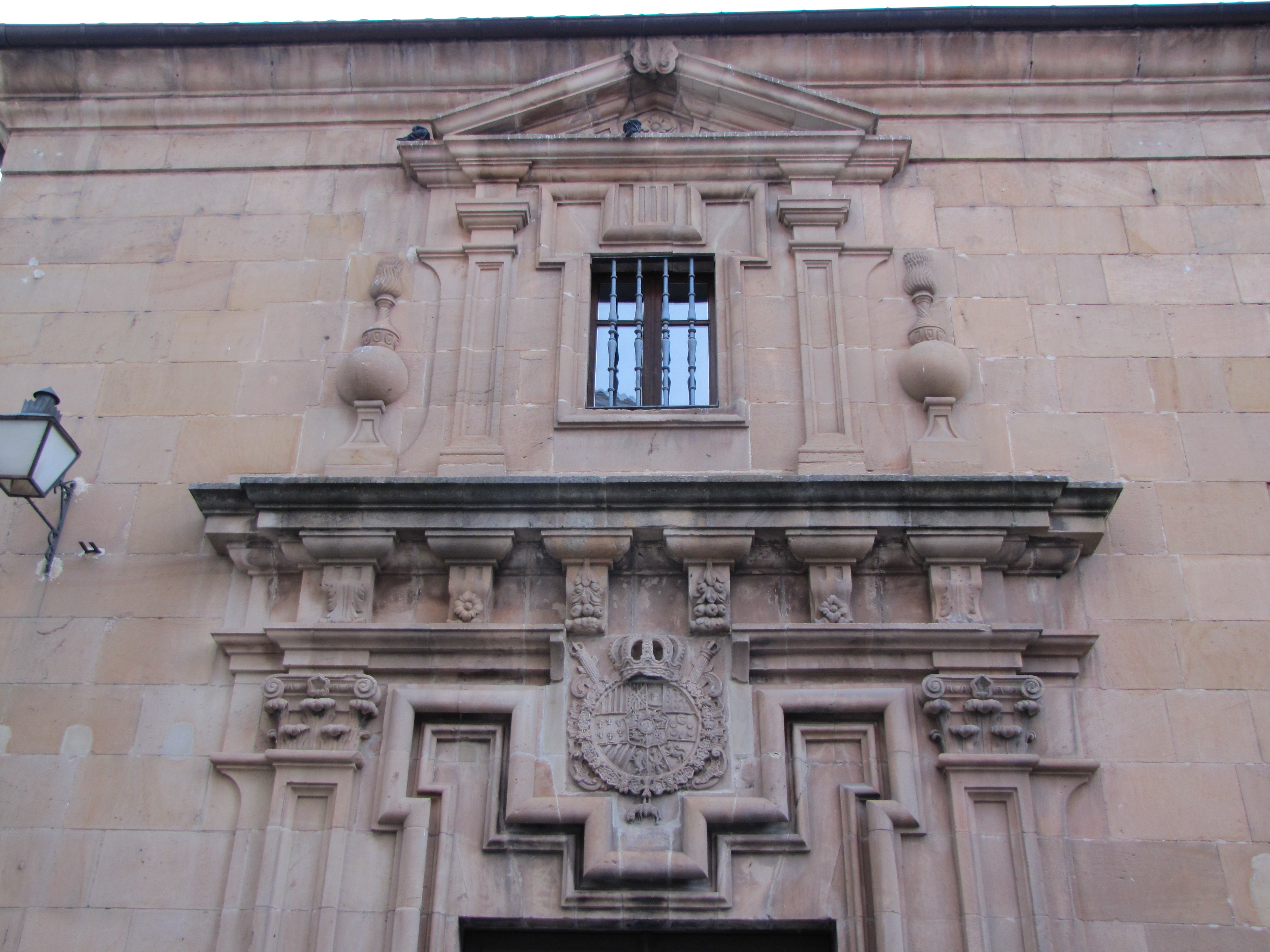 Detalle portada Colegio de la Compañía de Jesús en Soria.